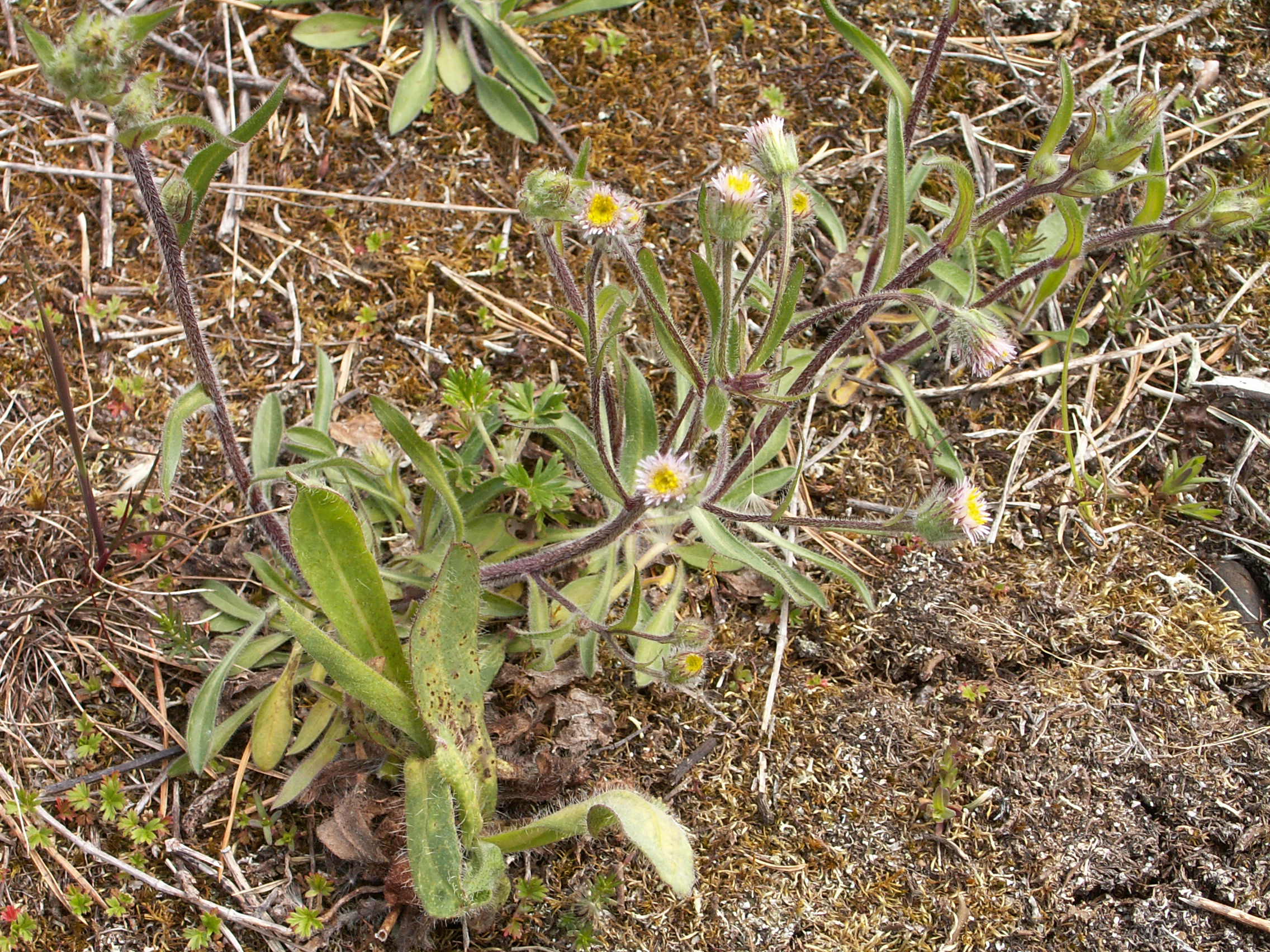 Gråbinka, Uppland.